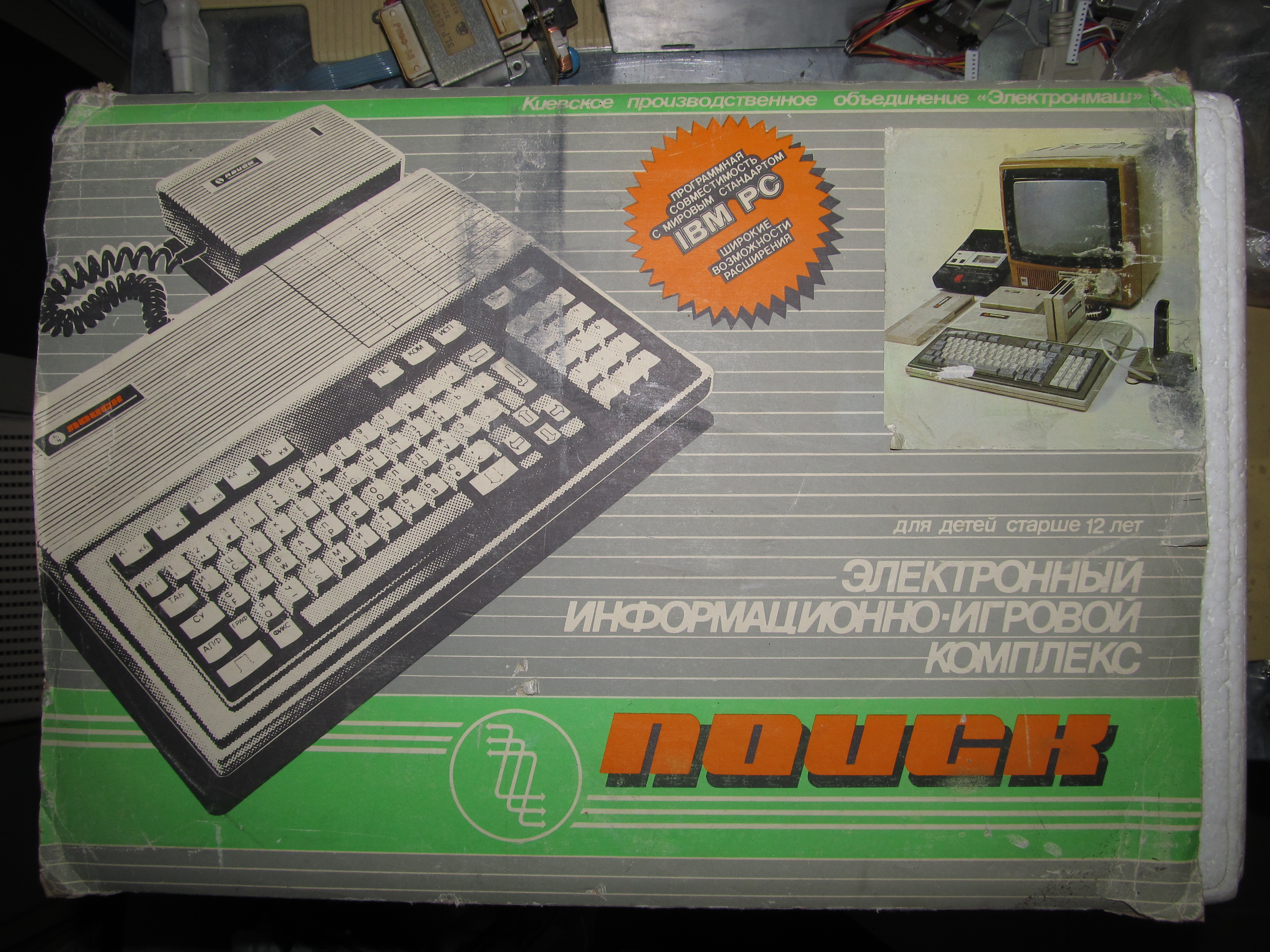 Заводская коробка от "Поиска"